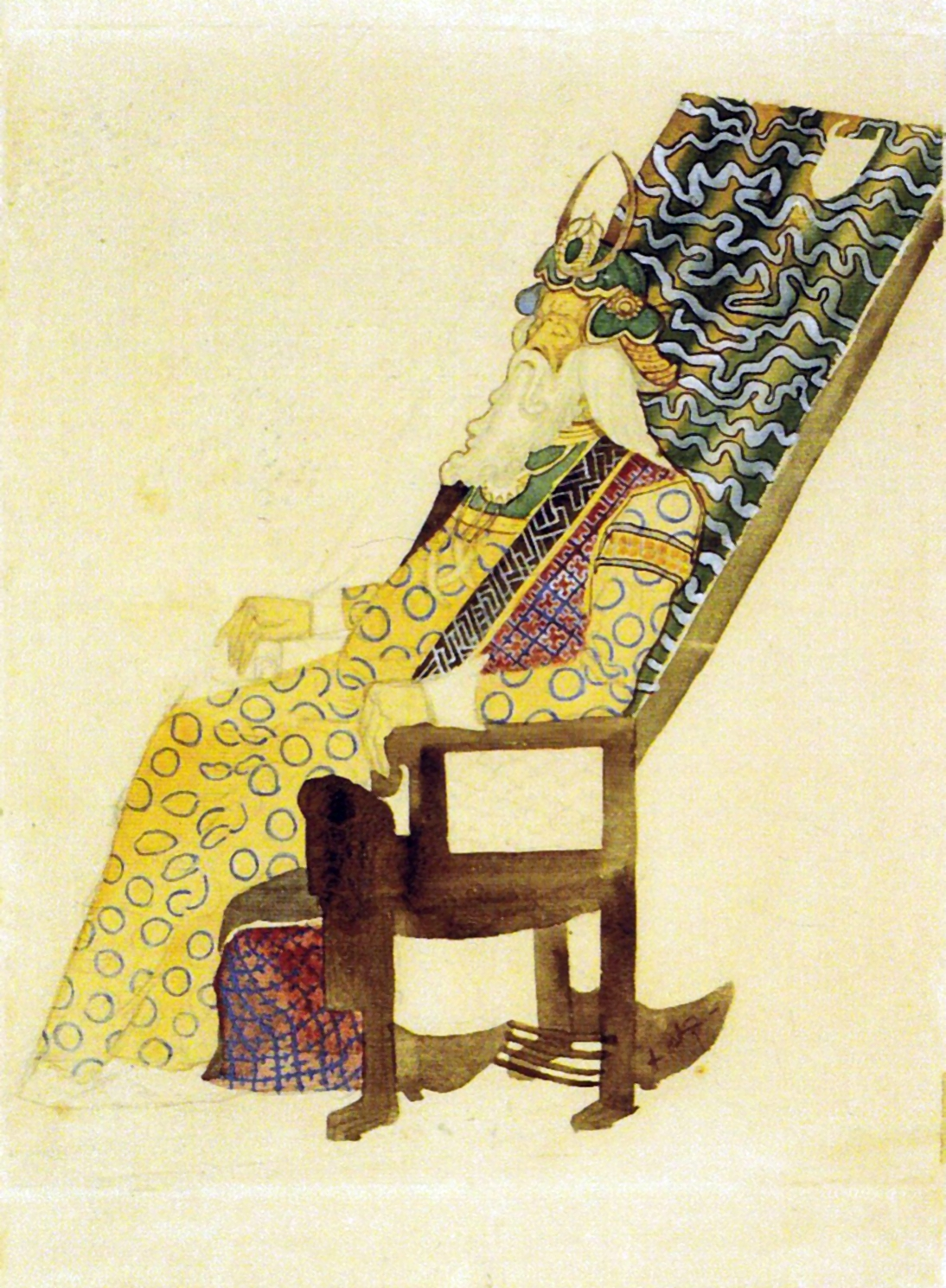 Alb împărat in jilț